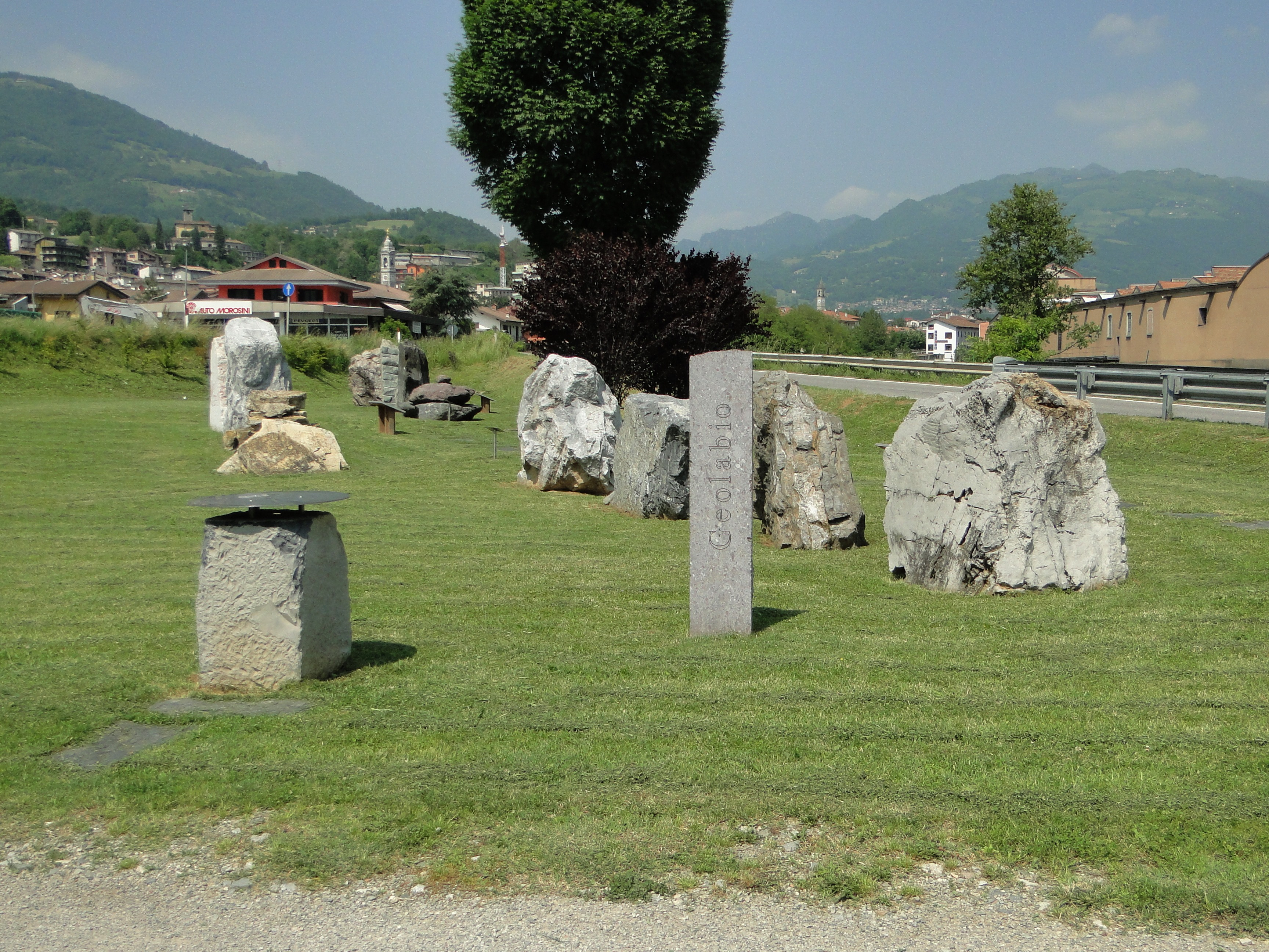 Giardino geologico, Gazzaniga (BG), Italia